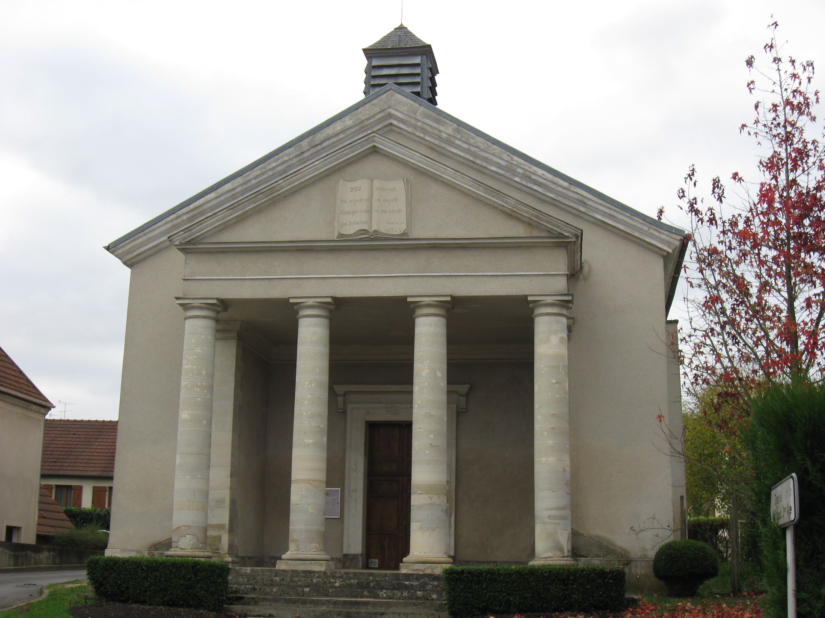 Temple protestant de Nanteuil-lès-Meaux. (Seine et Marne, région Île-de-France).